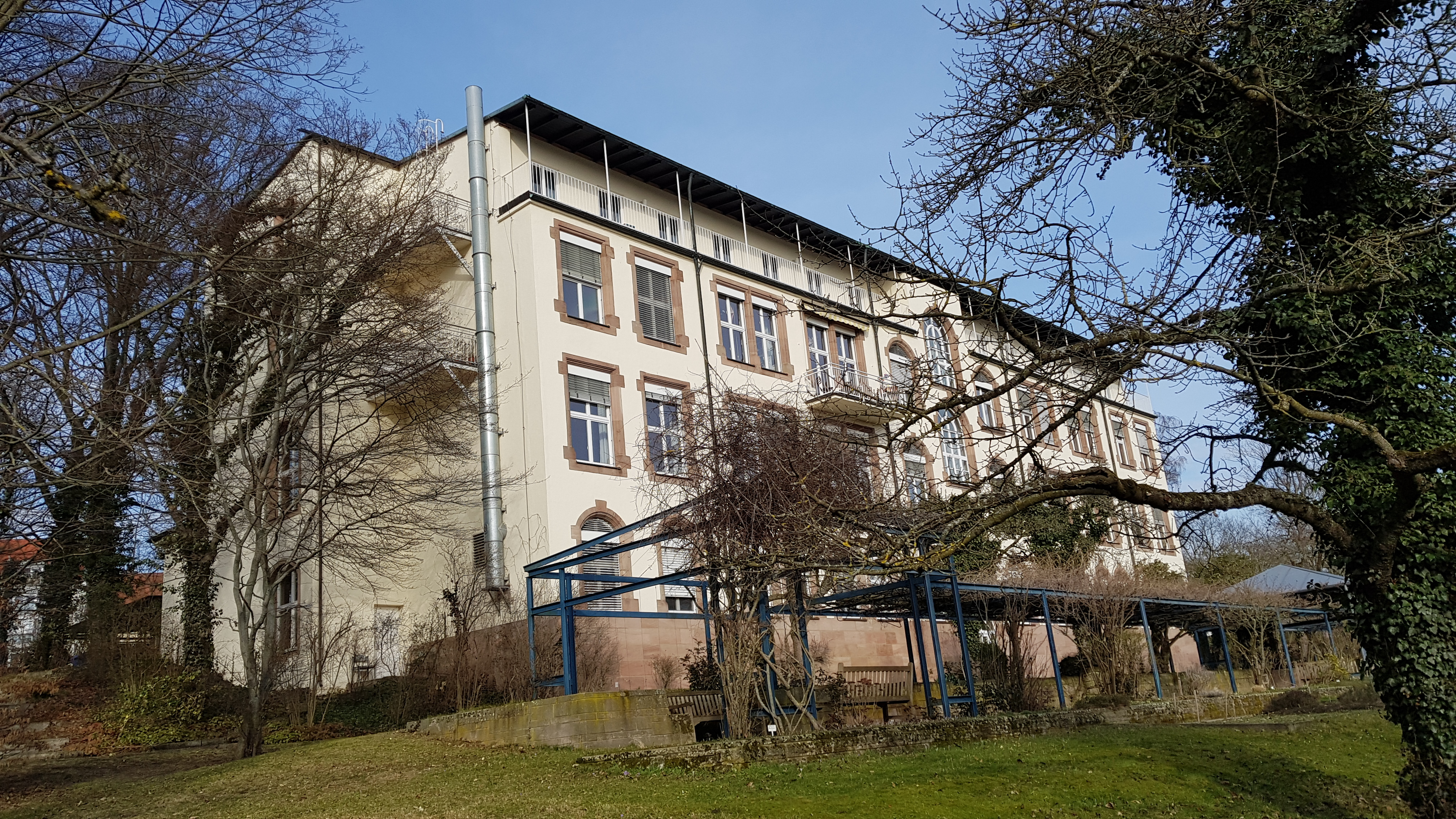 Ansicht des Predigerseminars Nürnberg in der Veilhofstraße 24 vom Garten her.